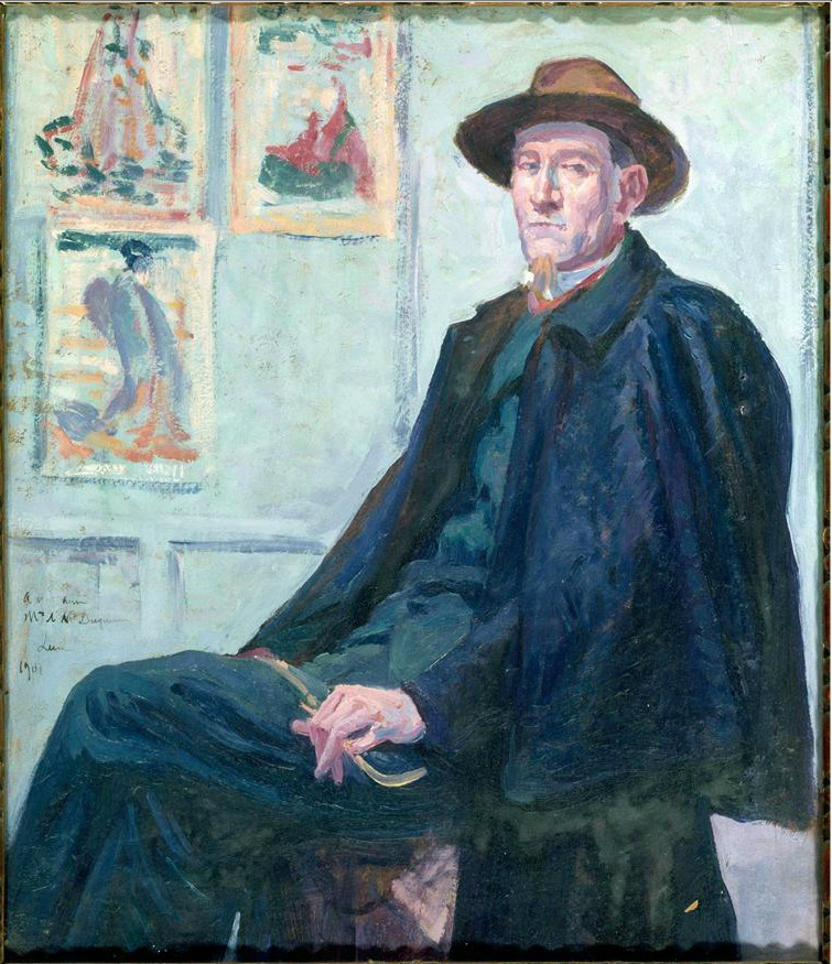 Etude pour le portrait de Fénéon de 1903, conservé au Musée de Nevers.